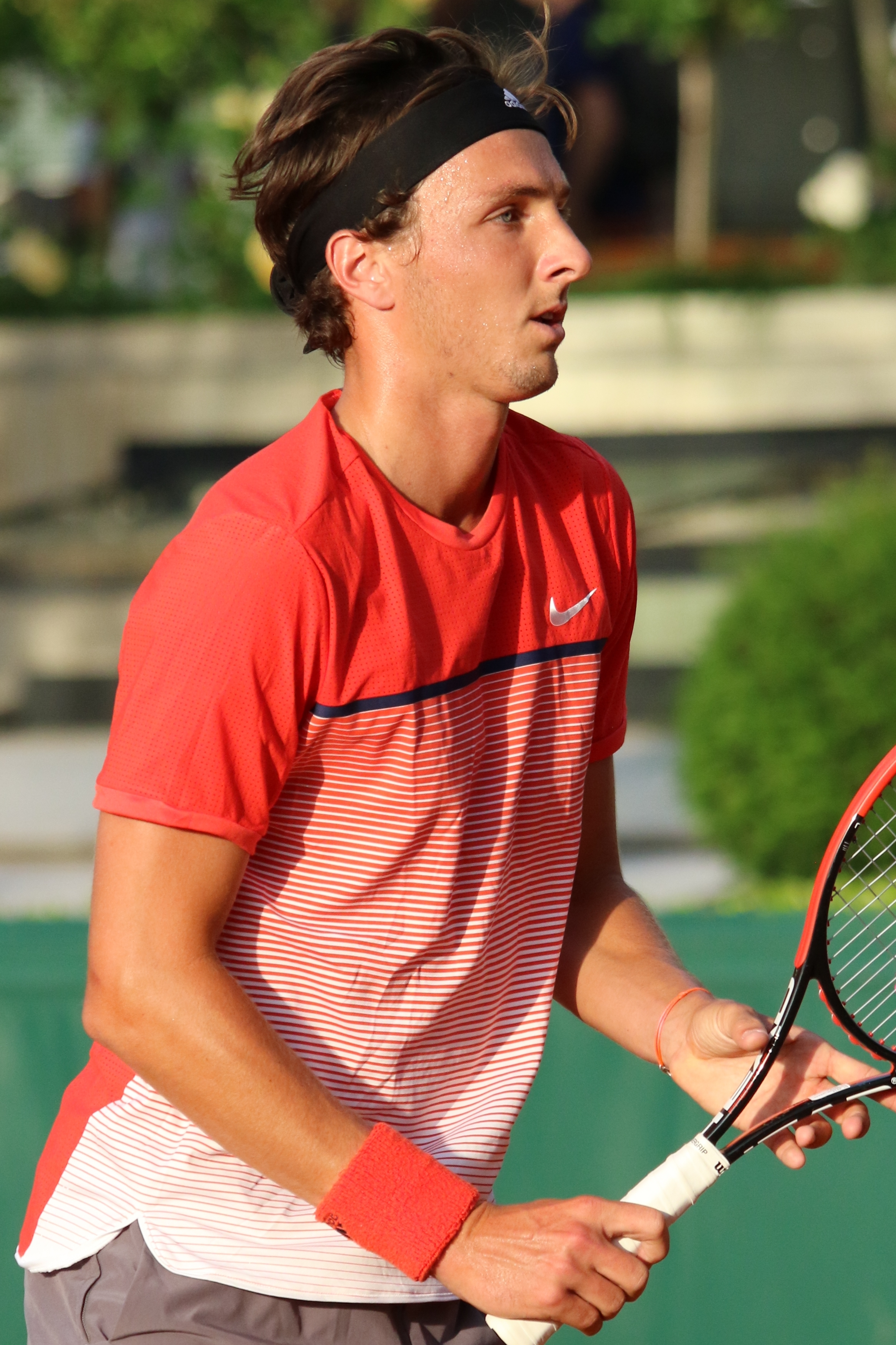 Rinderknech RG18